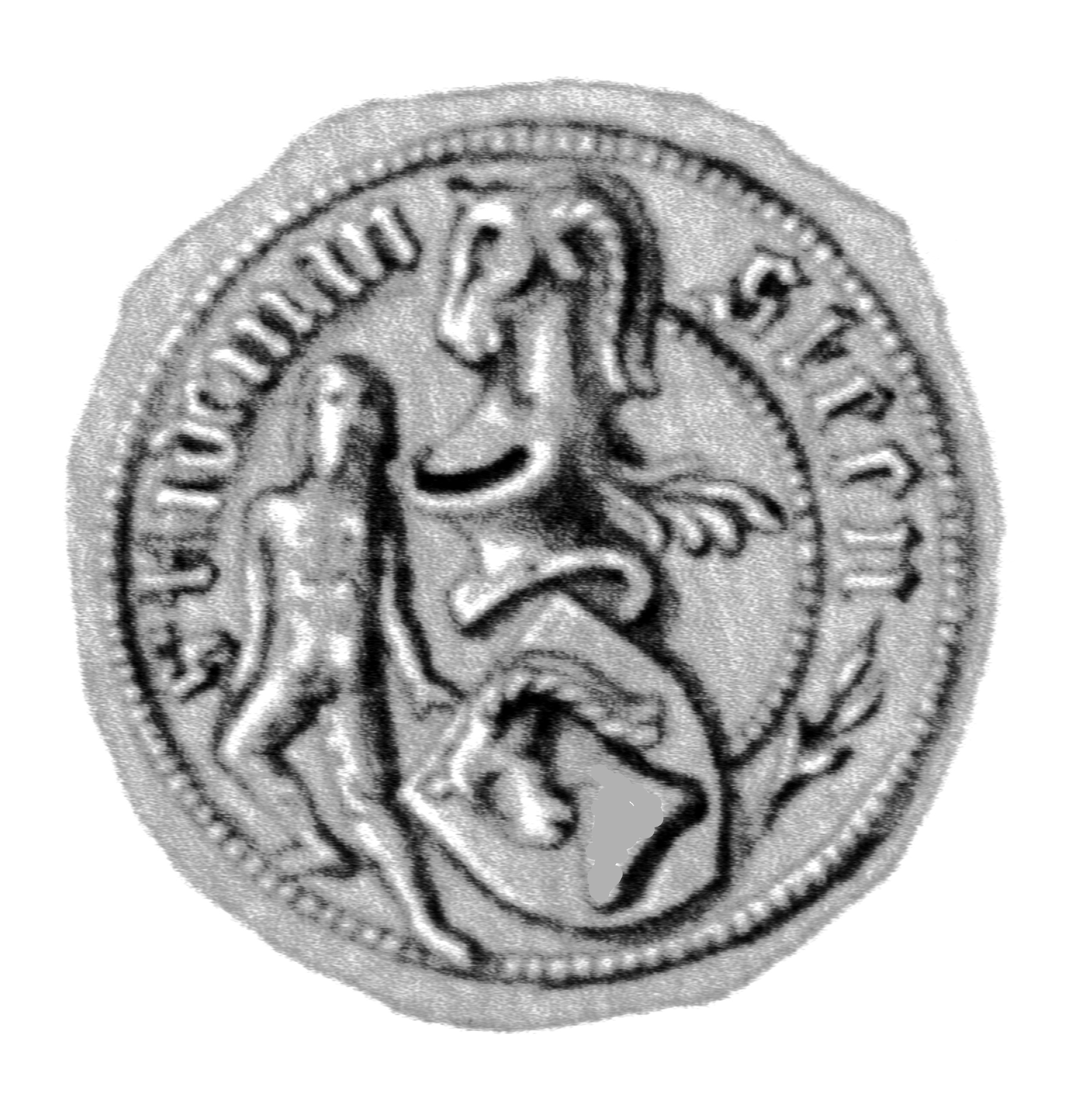 Siegel des Ratsmannes Tidemann Steen. Das Siegel stammt aus der Zeit um 1434. Siehe Emil Ferdinand Fehling: Lübeckische Ratslinie, Nr. 467 (Tidemann Steen BM).